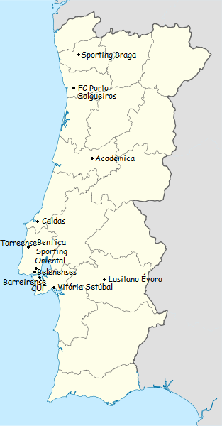 Carta dos clubes participantes do campeonato de portugal de futebol de primeira divisao 1957-1958